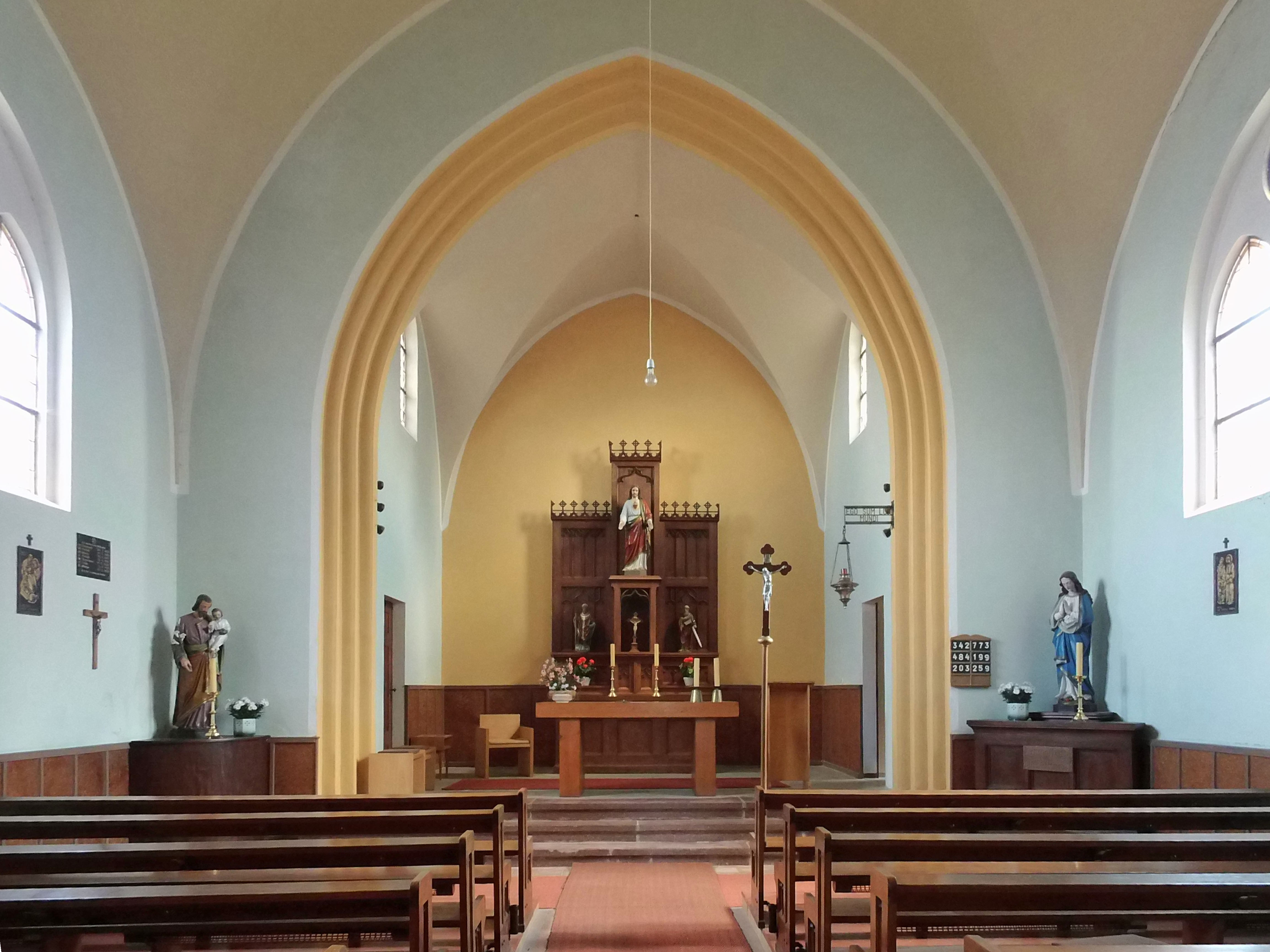 Katholische Kirche St. Josef in Harbke (Sachsen-Anhalt)